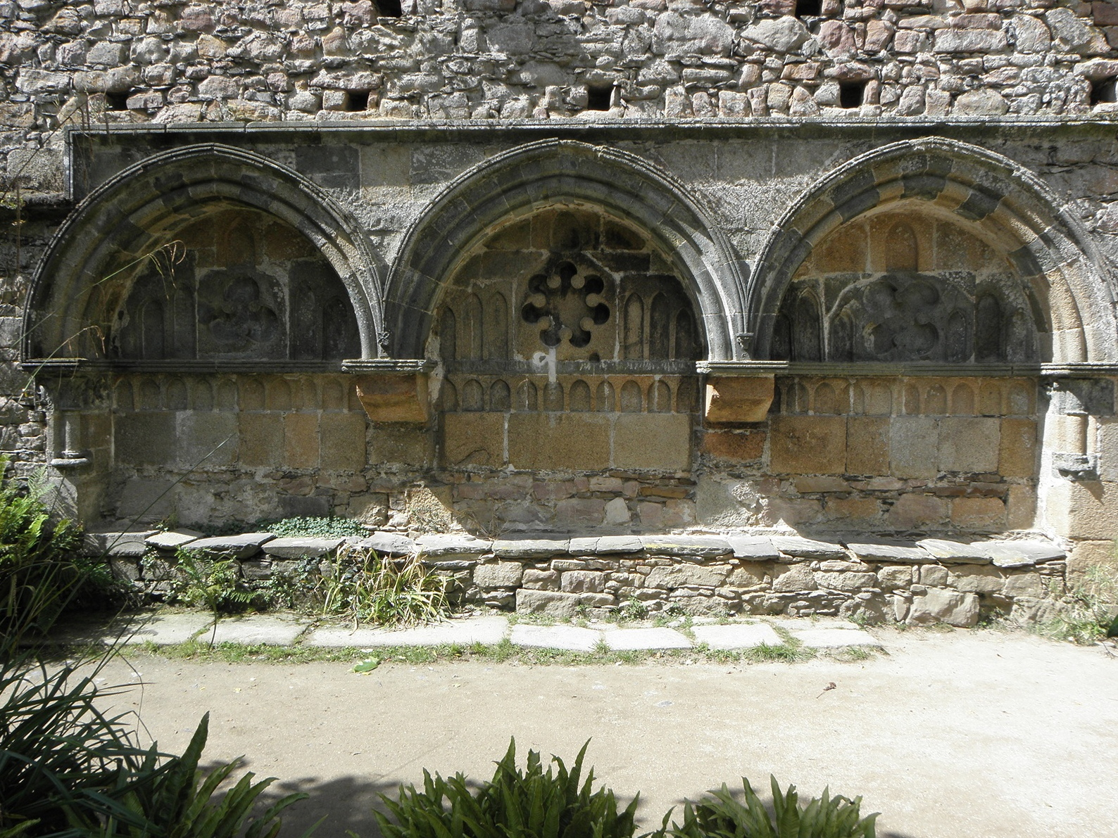 Lavabos du cloître de l'abbaye de Beauport en Paimpol (22). .